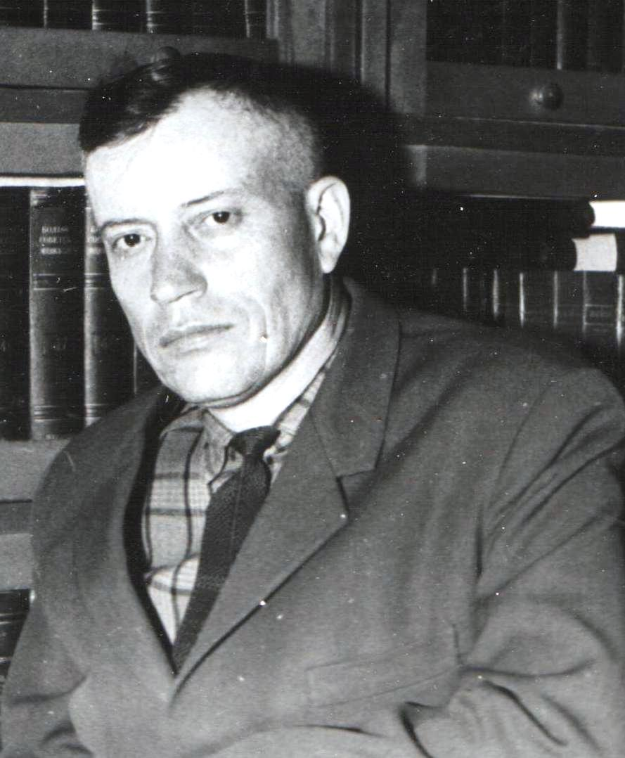 Буняк Іван Якович